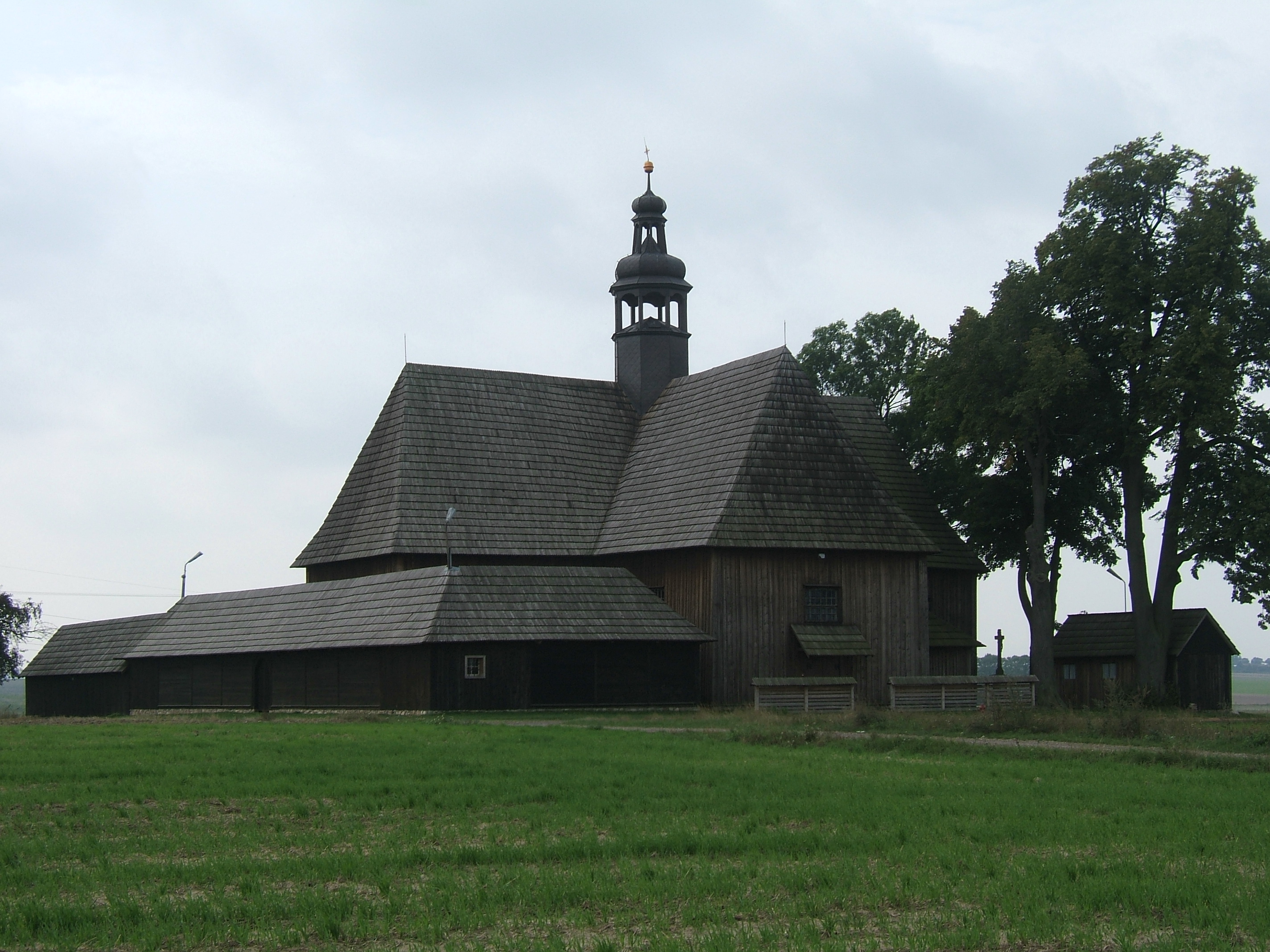 Drewniany kościół odpustowy pod wezwaniem Narodzenia Najświętszej Maryi Panny na "Pólku" pod Bralinem , widok z polnocnego zachodu.